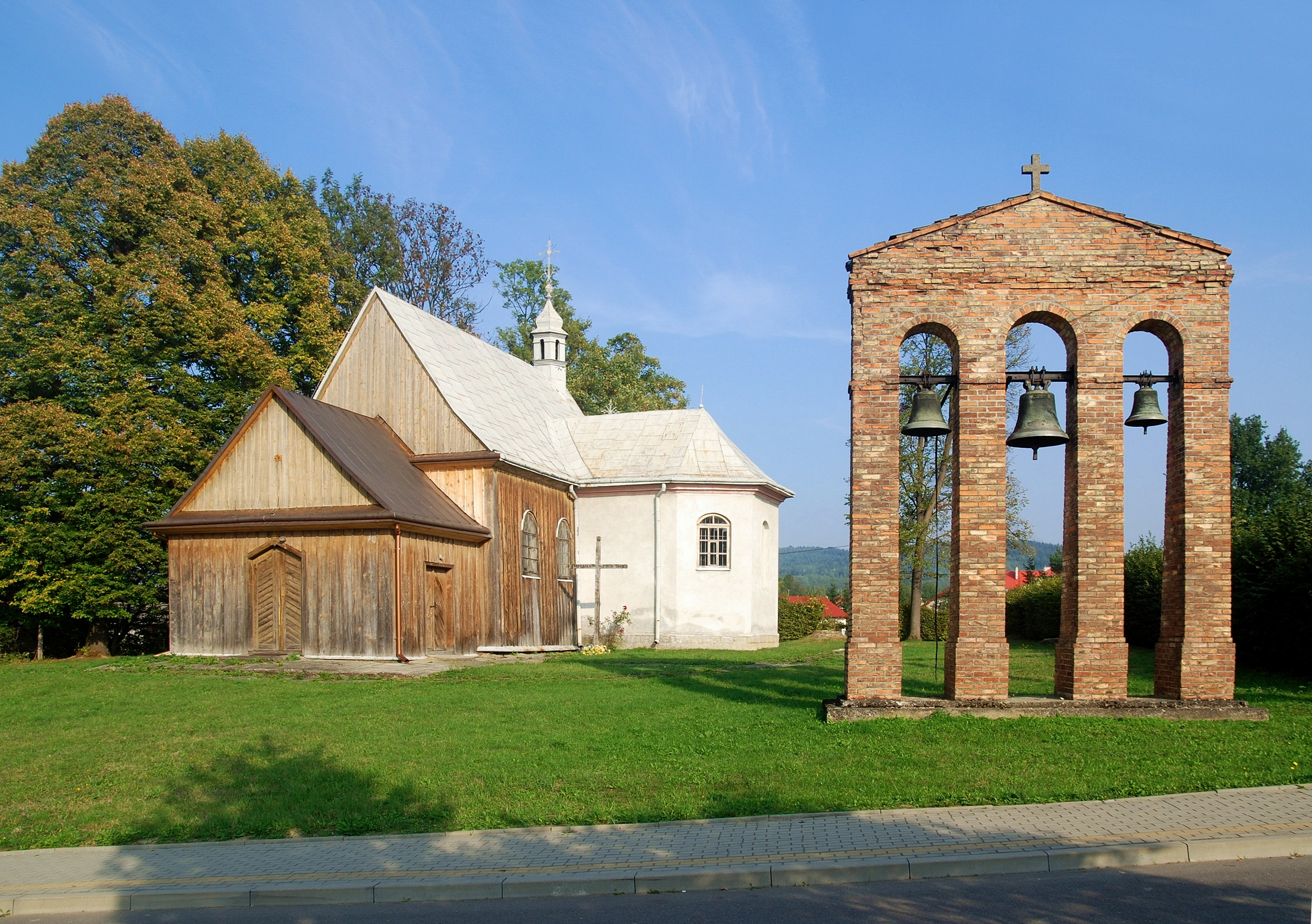 kościół